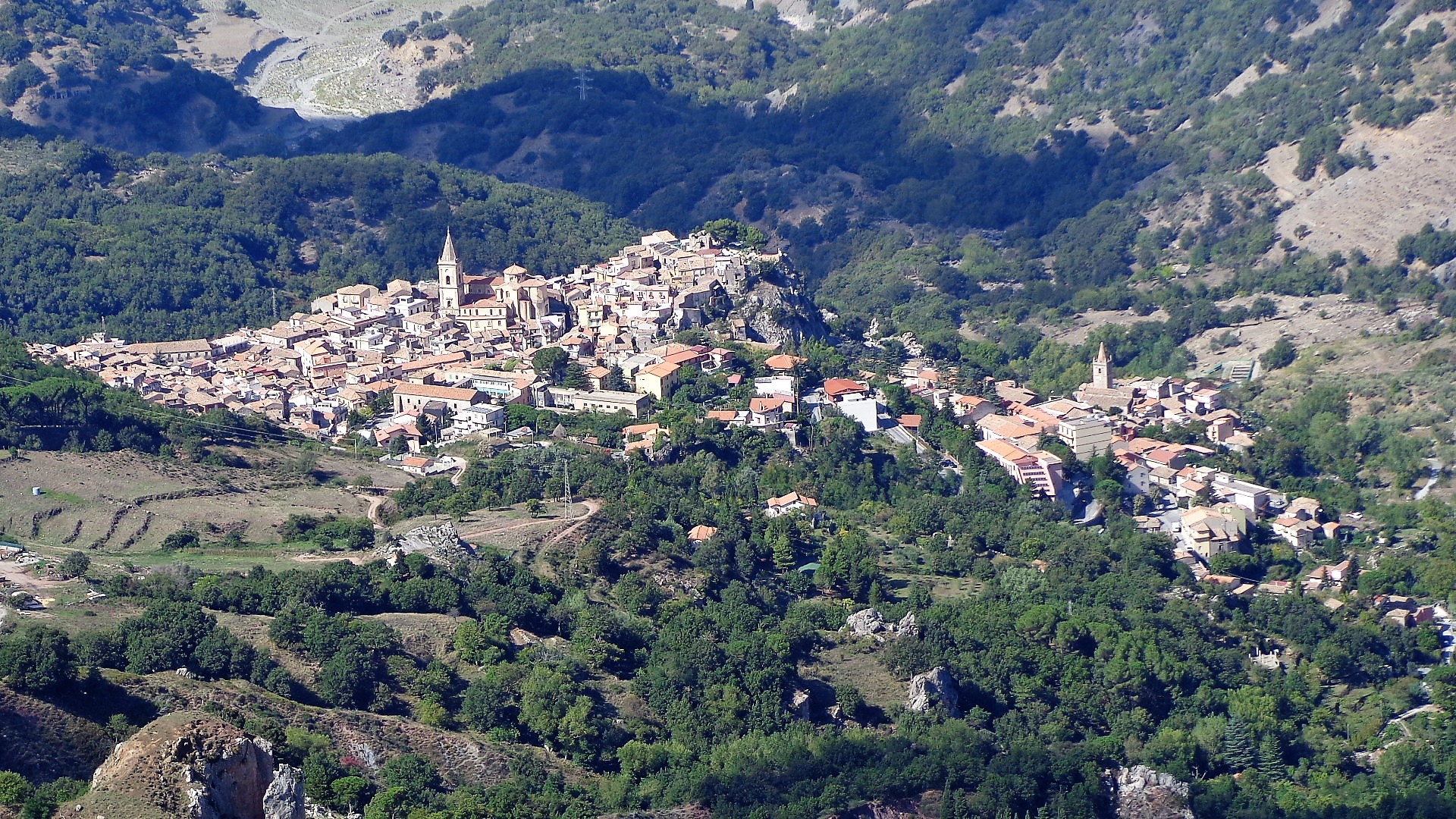 Vetta, veduta totale di Novara di Sicilia.